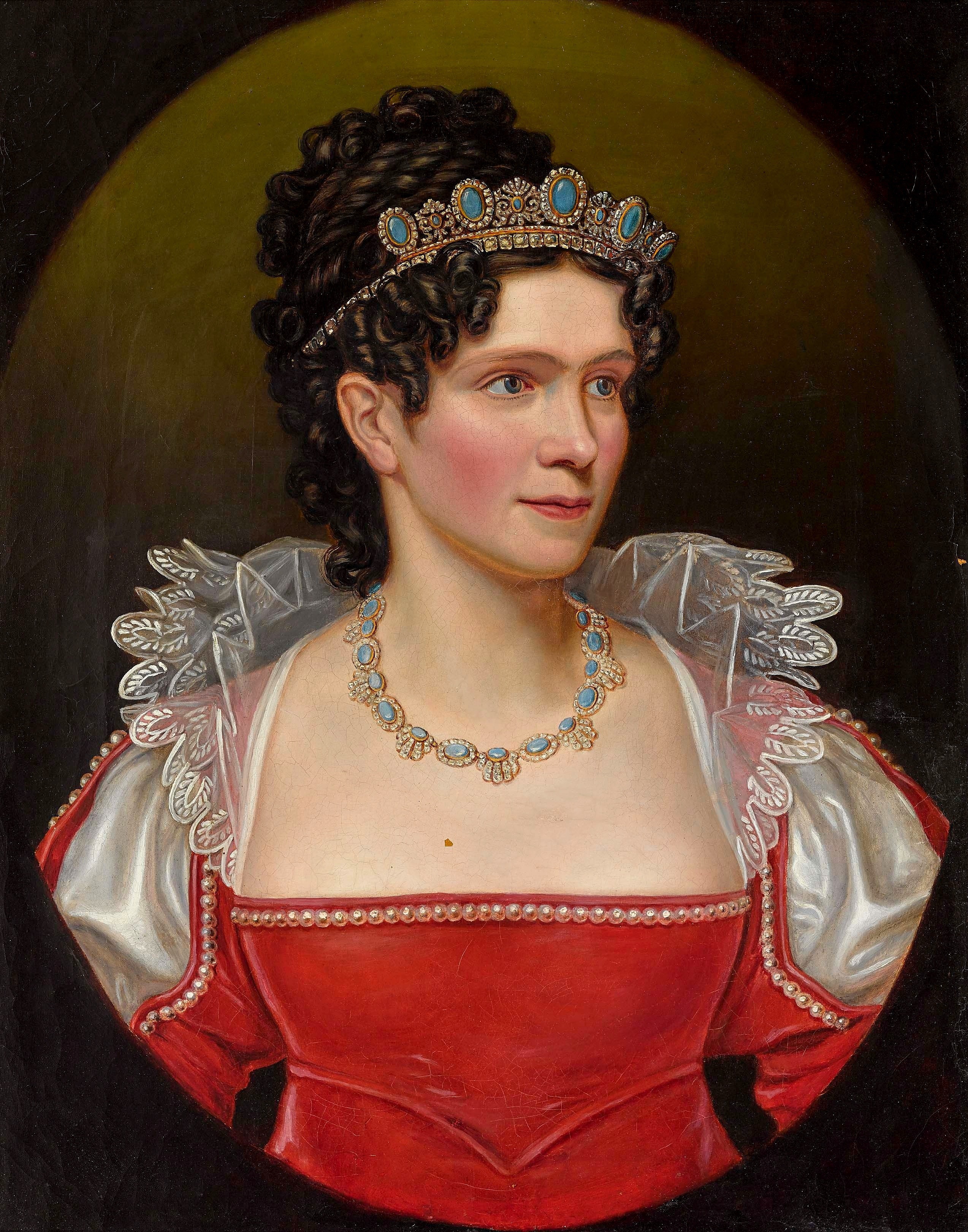 Königin Karoline von Bayern (1771-1841)